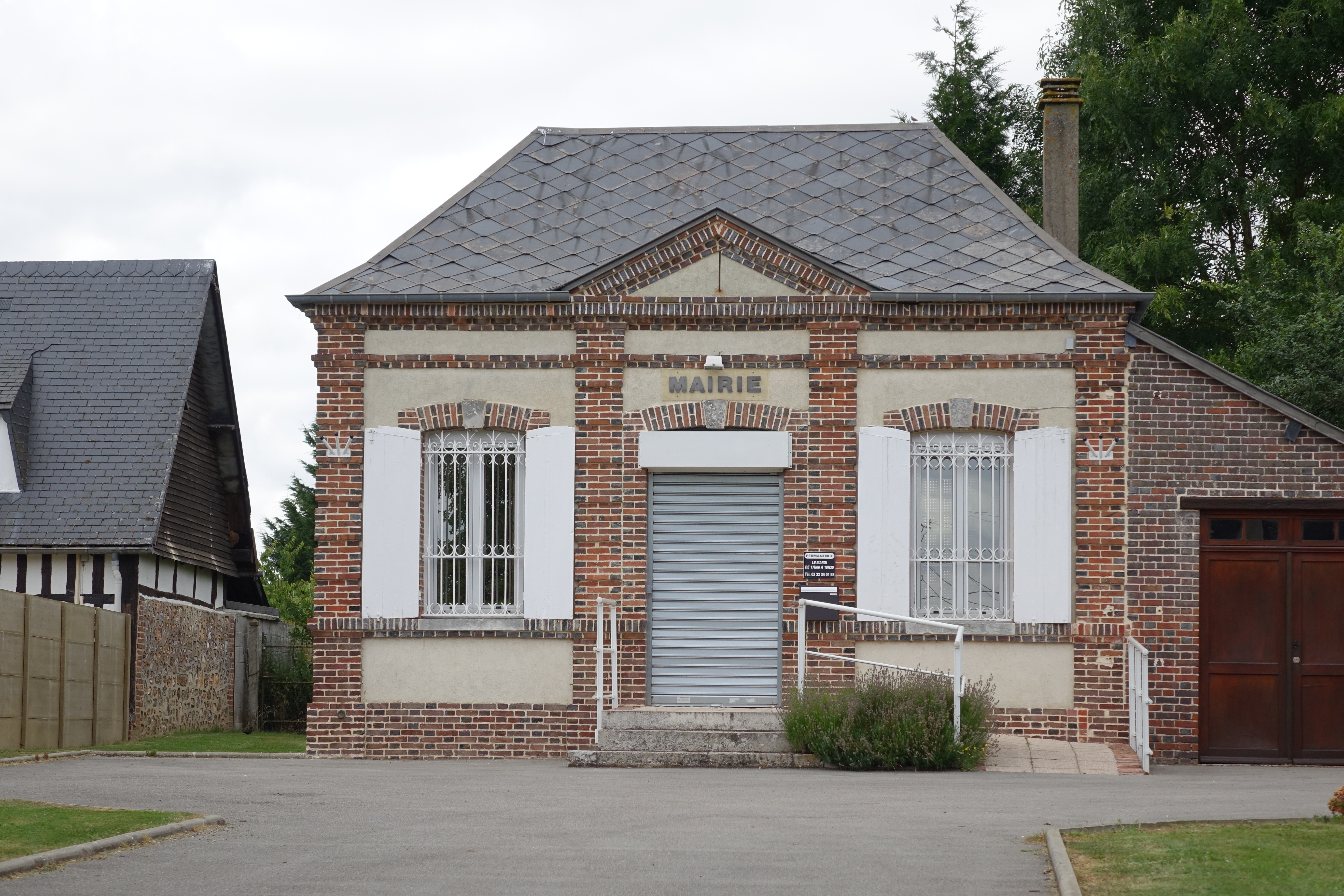 Mairie de Bernienville, Eure, France